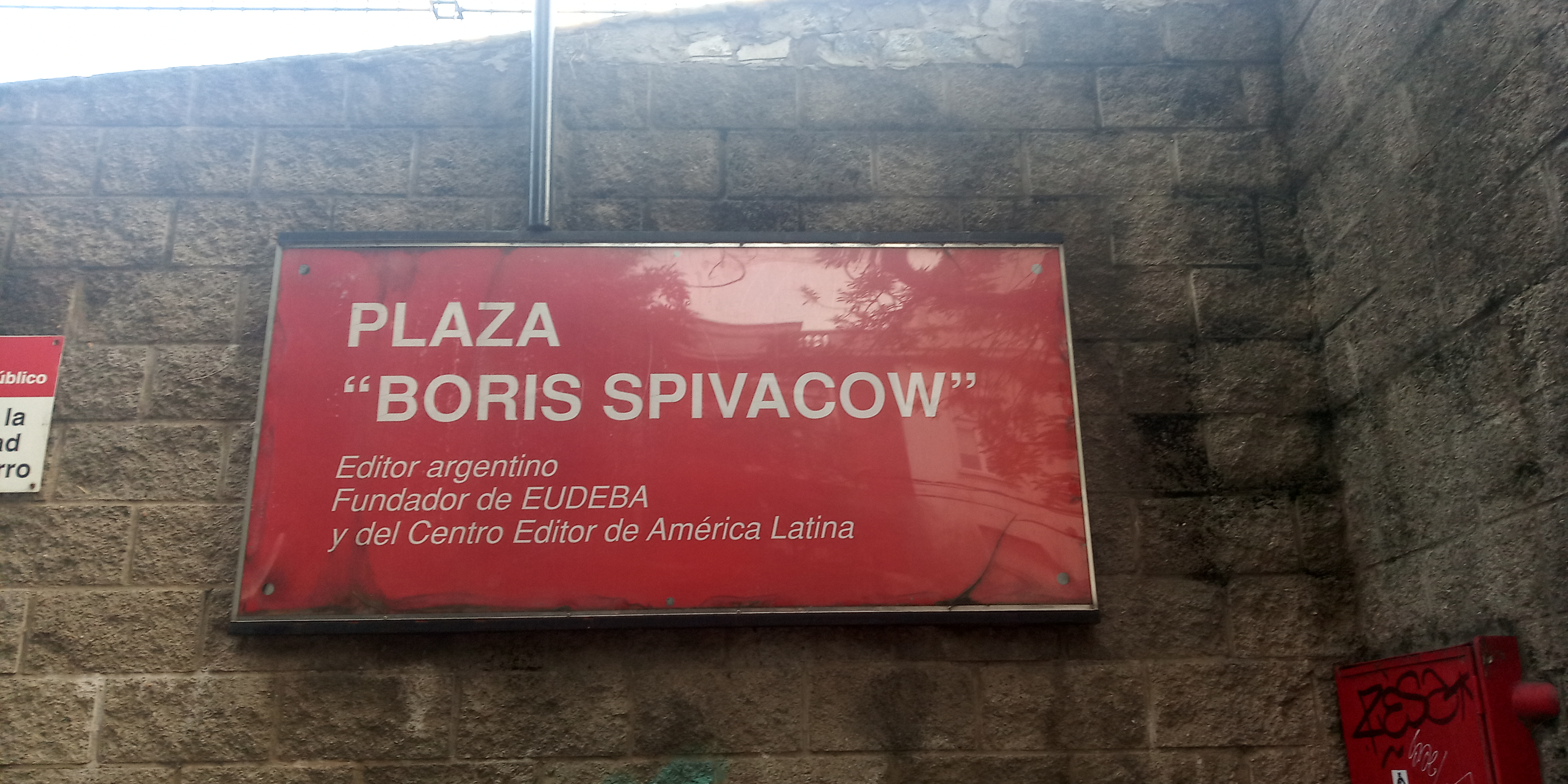 Cartel de la plaza Boris Spivacow en las inmediaciones de la biblioteca nacional argentina